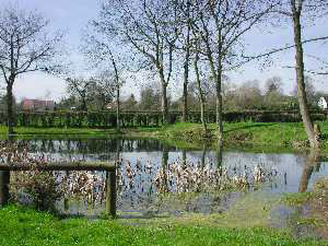 lamarre